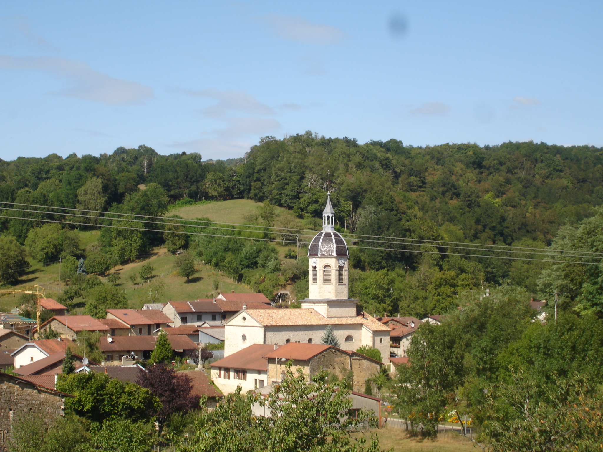 Village de Salavre dans le Revermont - département de l'Ain